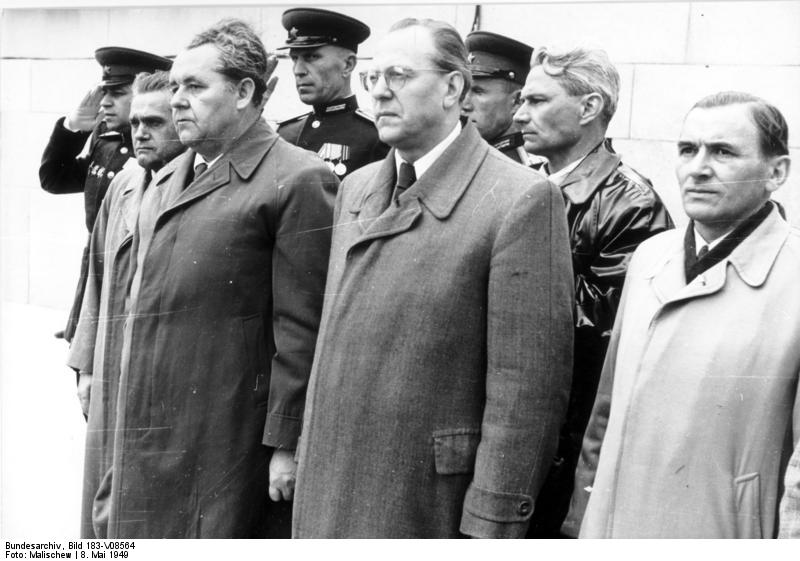 ADN-ZB Berlin, 8.5.1949 Einweihung des sowjetischen Ehrenmals in Treptow - zur Delegation der SED gehören Otto Grotewohl (vorn 2.v.r.) und Paul Merker (links daneben). Aufnahme: SNB/Malischew 5050-50